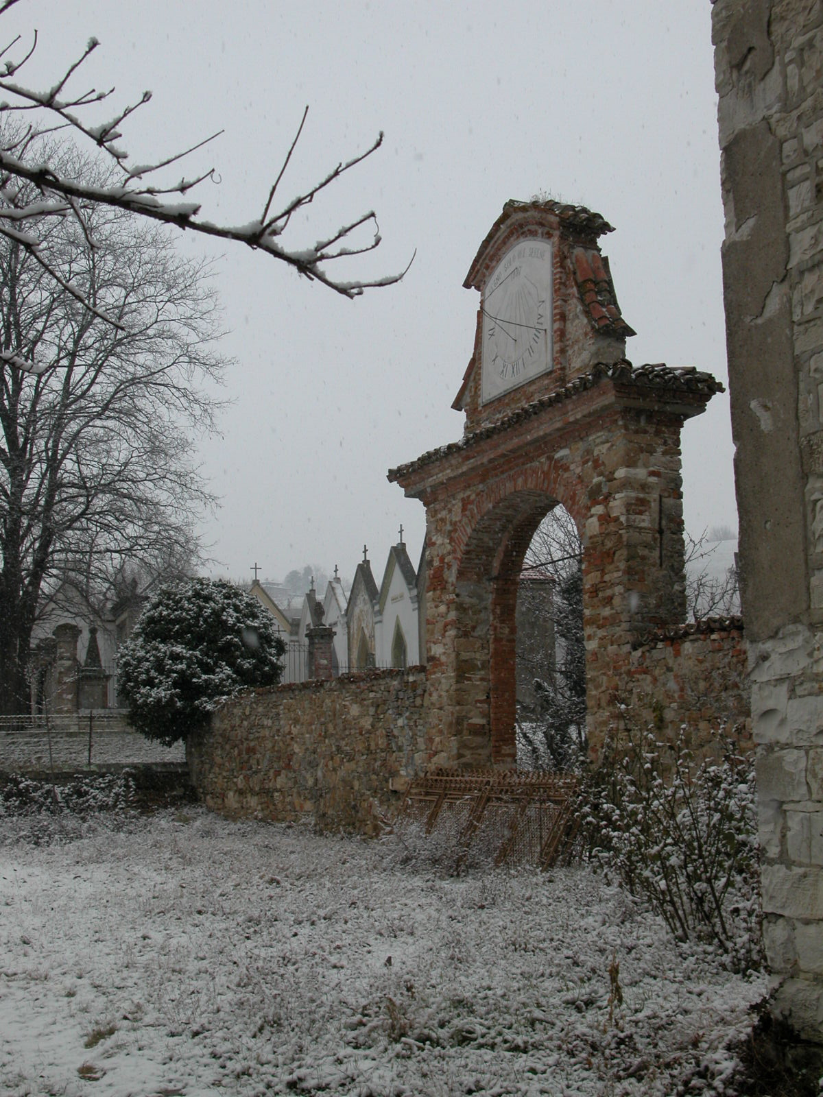 Foto mia personale, meridiana a Pomaro frazione di Piozzano, provincia di Piacenza.